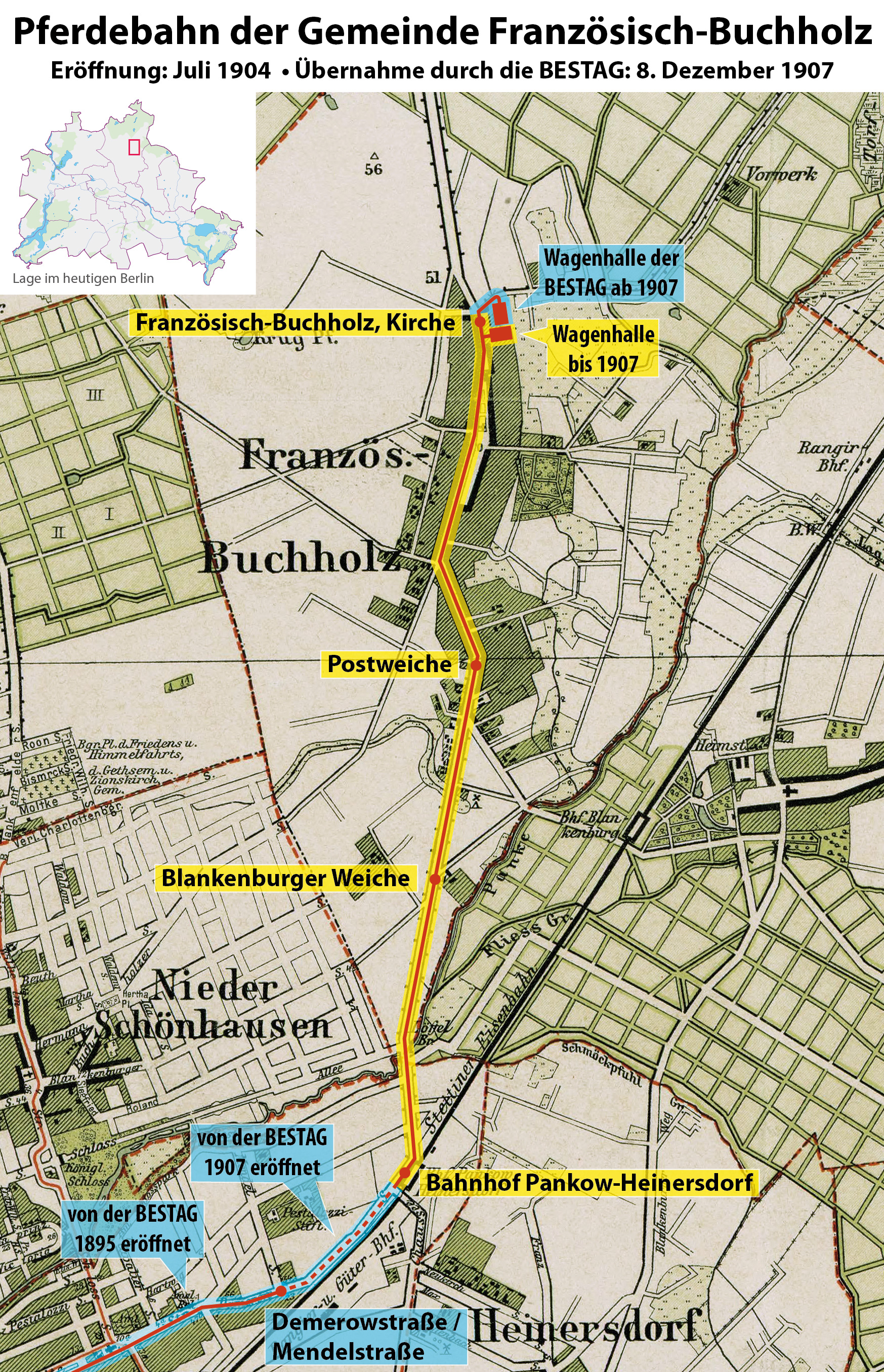 Karte der Pferdebahn der Gemeinde Französisch-Buchholz